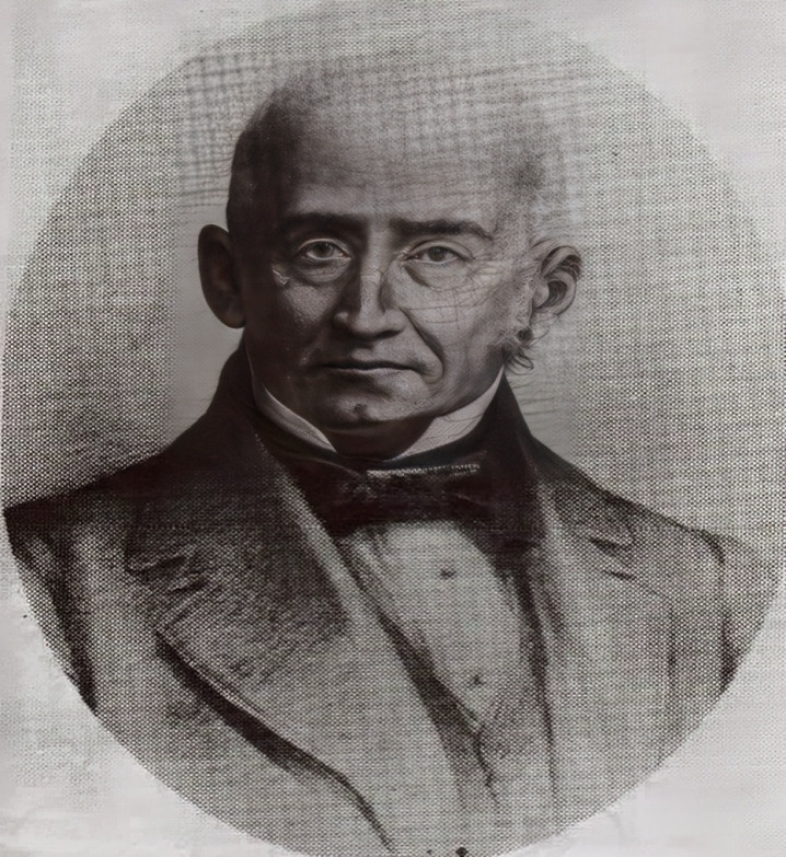 Foto tomada de la revista 30-31 de la Academia Costarricense de Ciencias Genealógicas